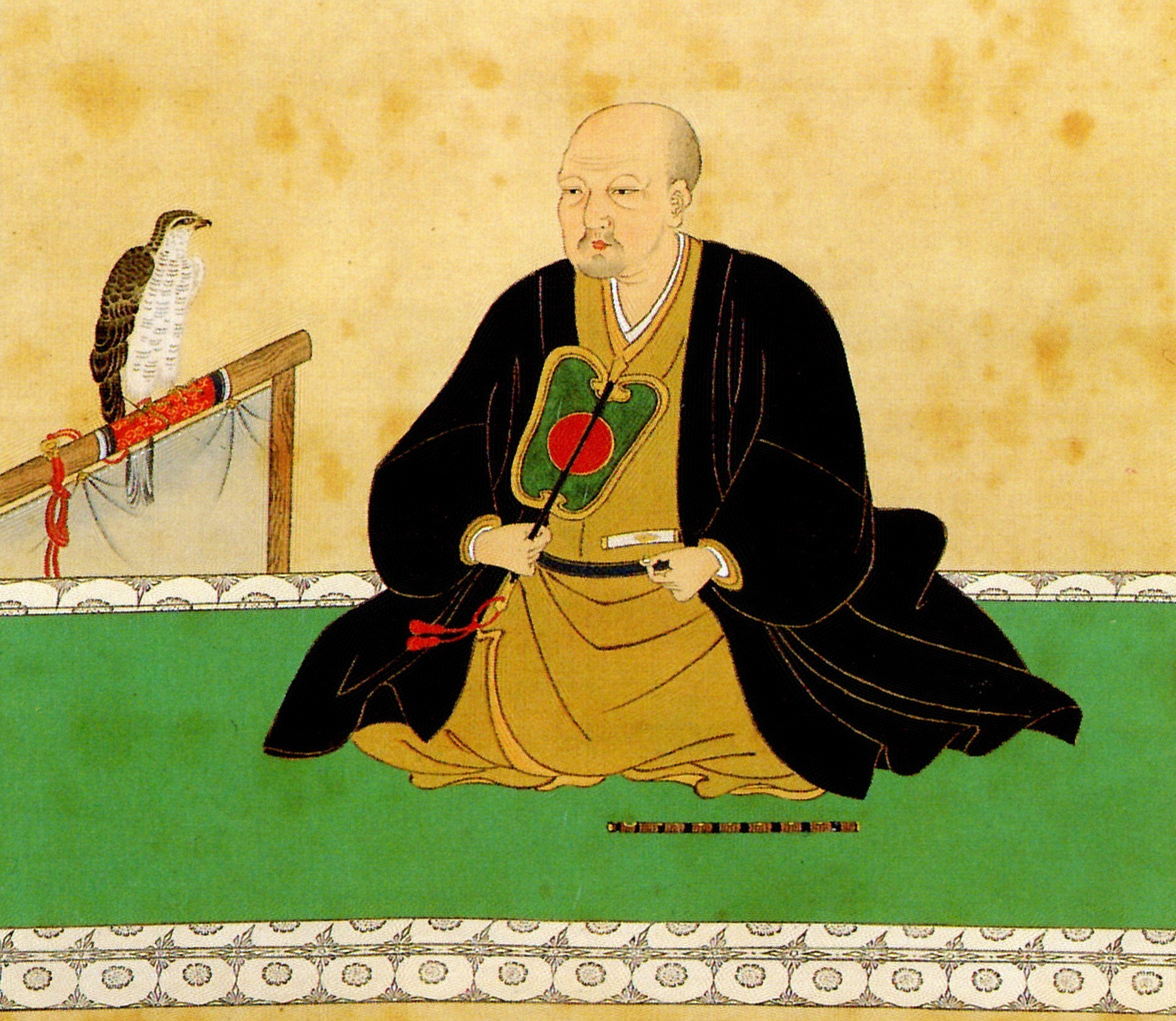 松浦隆信の肖像。